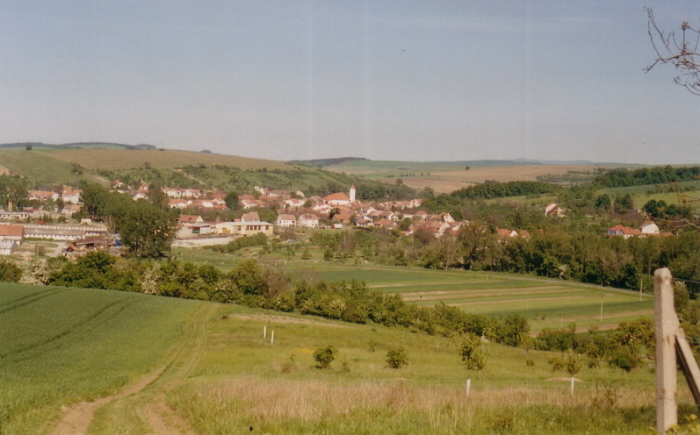 Obec Louka při pohledu z lokality Nad Radostnou, tedy od jihozápadu. Ve středu obce je viditelný nový kostel, vlevo budovy JZD.